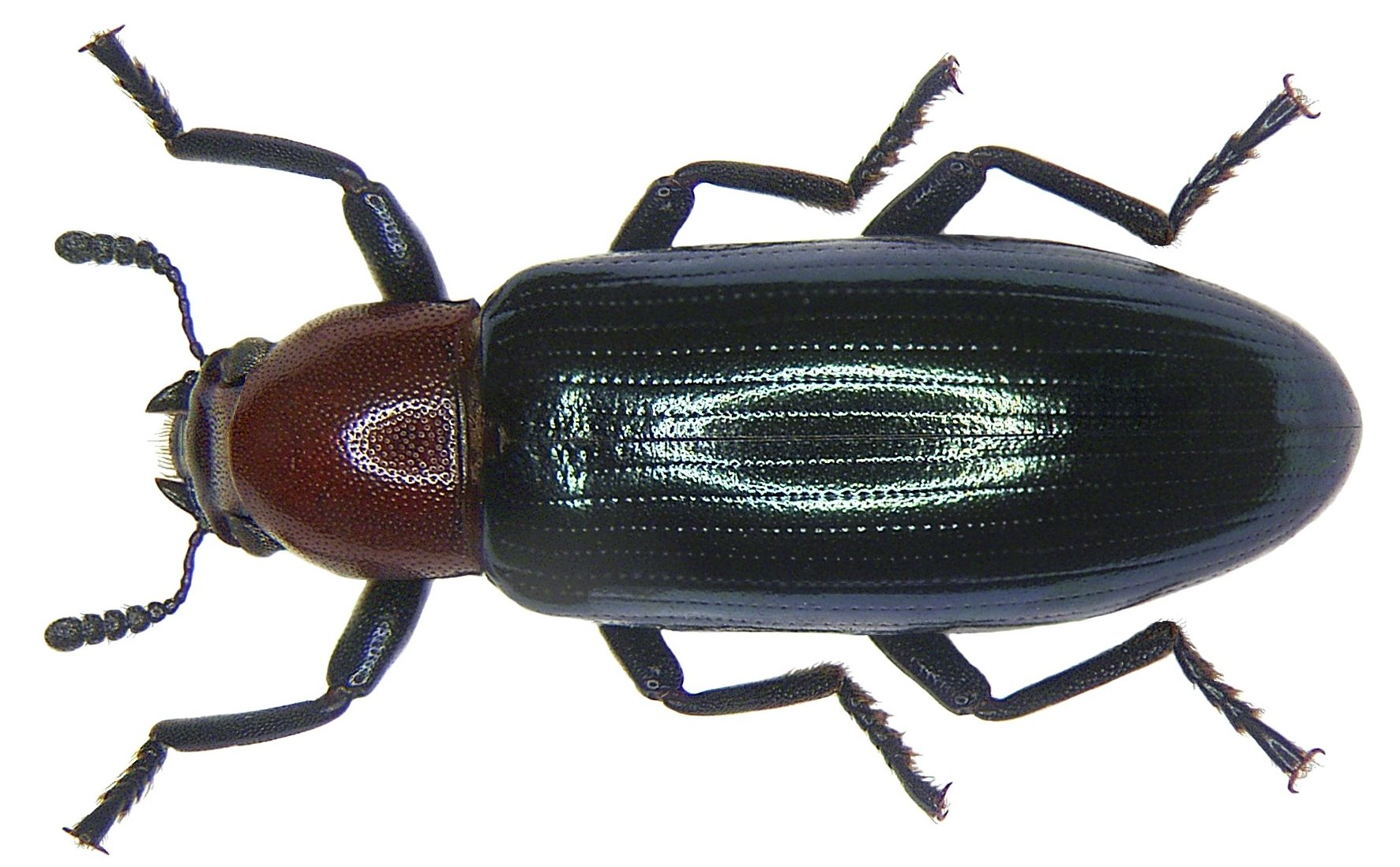 Familie: Tenebrionidae Groesse: 10,2 mm Fundort: Indonesien, Sulawesi, Toraut leg. A.Skale, 2006; det. R.Grimm, 2006 Photo: U.Schmidt, 2008